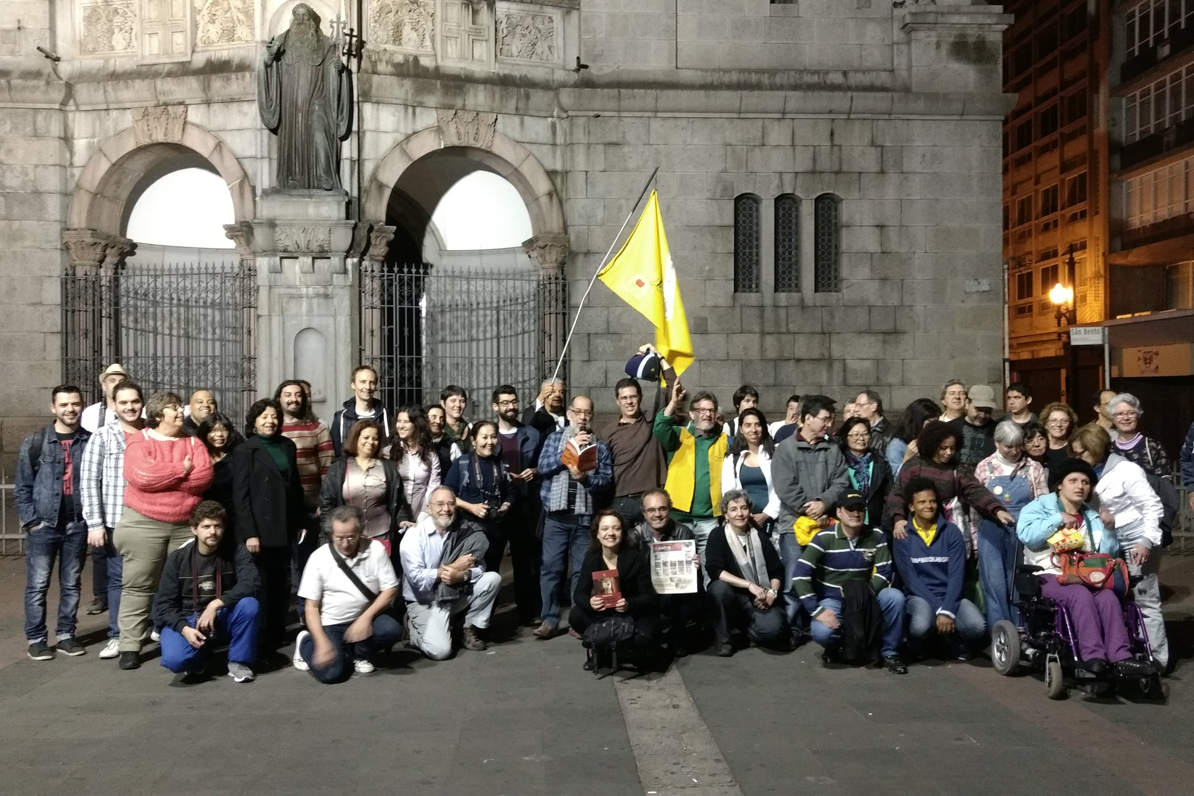 A Caminhada Noturna é um passeio gratuito de caráter turístico e cultural pelo centro da cidade São Paulo que é realizado há mais de uma década. Inicia-se todas as quintas-feiras nas escadarias do Teatro Municipal, sempre às 20 horas. A Caminhada segue o estilo dos notórios walking tours, comuns em diversas capitais em todo o mundo, muito embora seja totalmente gratuita.